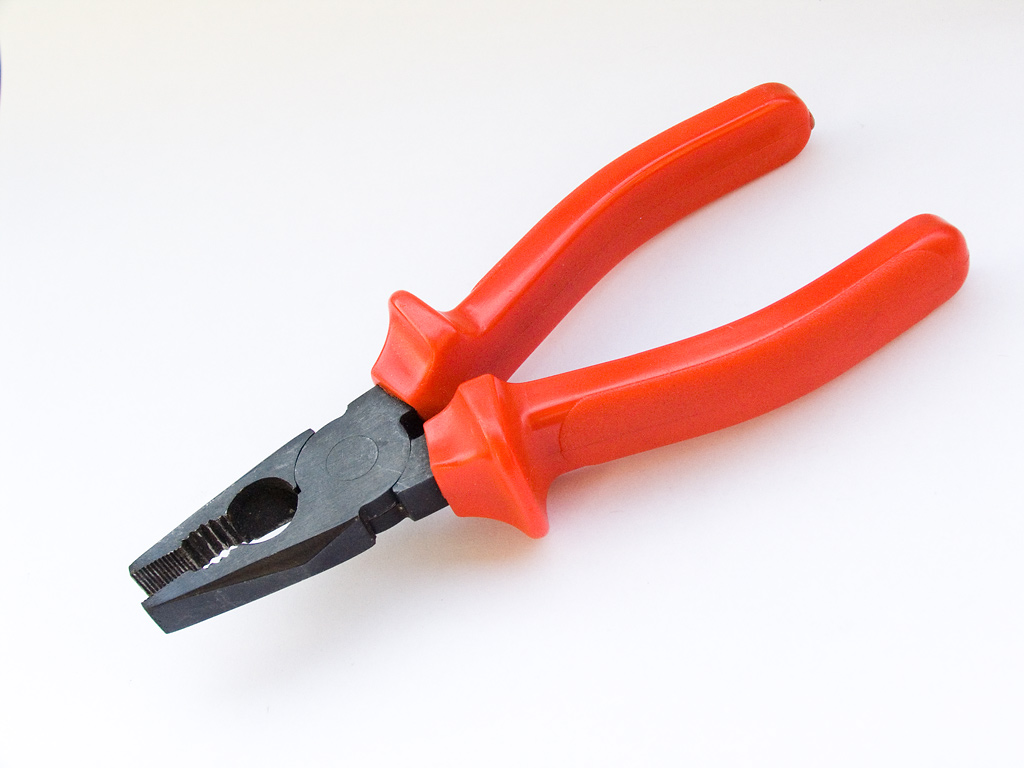 Распространённые пассатижи с пластиковыми (изолированными) ручками.